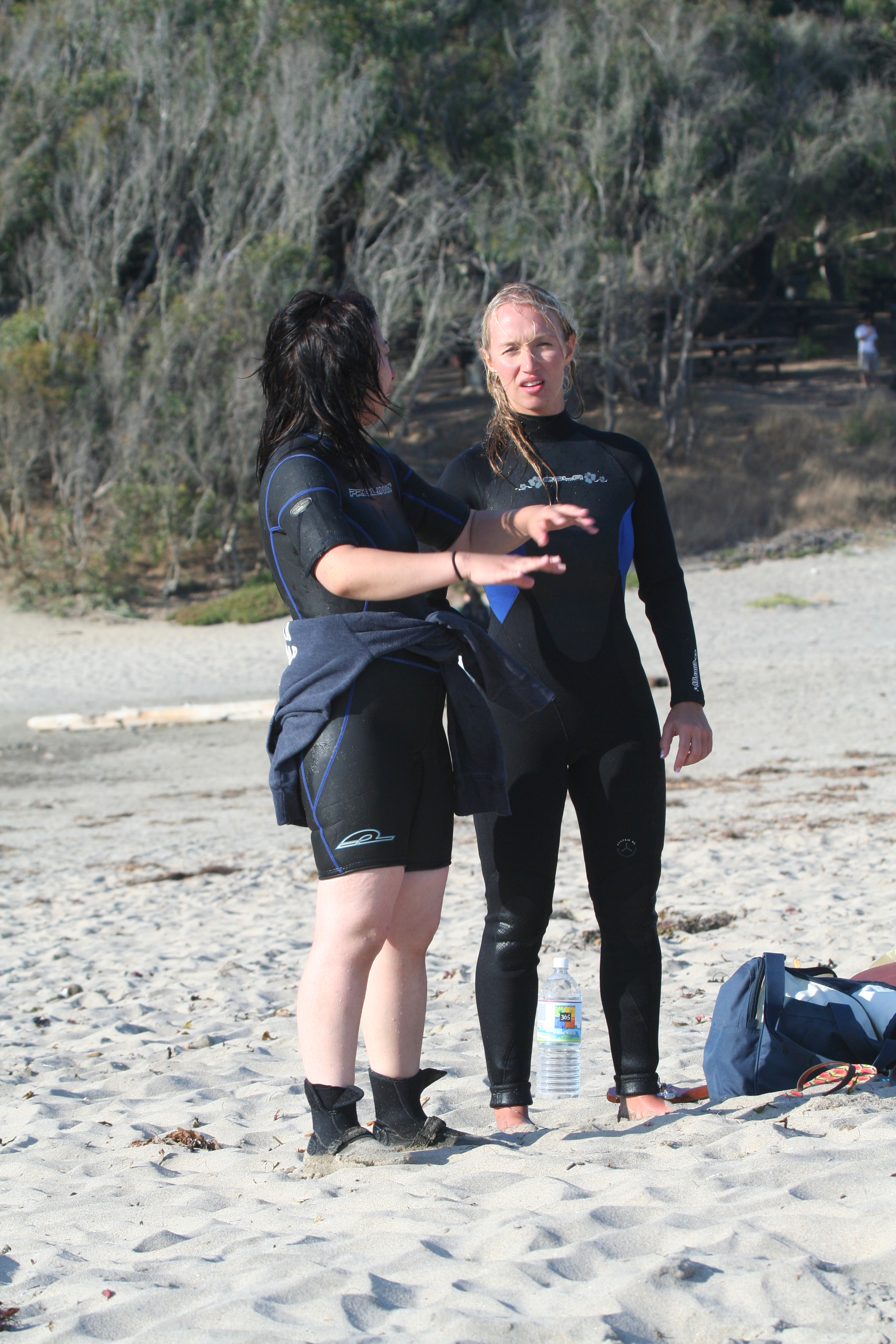 Women in wet suits